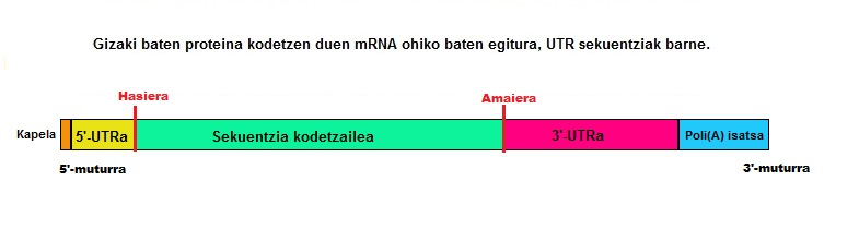 Guztiz prozesaturiko mRNA batean 5’ kapela, 5’ UTRa, gune-kodetzailea, 3’ UTRa eta poli(A) isatsa aurkitzen dira.